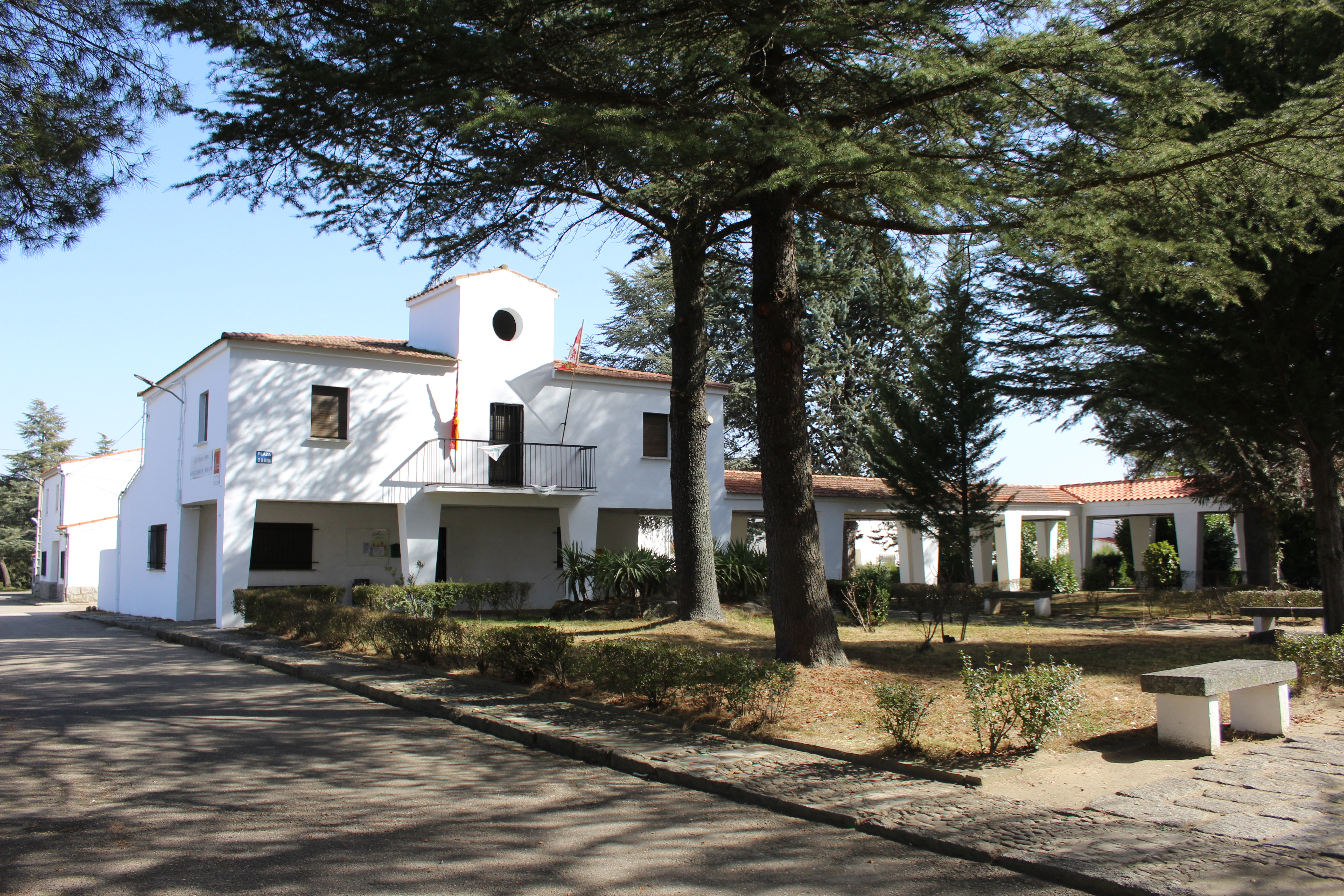 Ayuntamiento